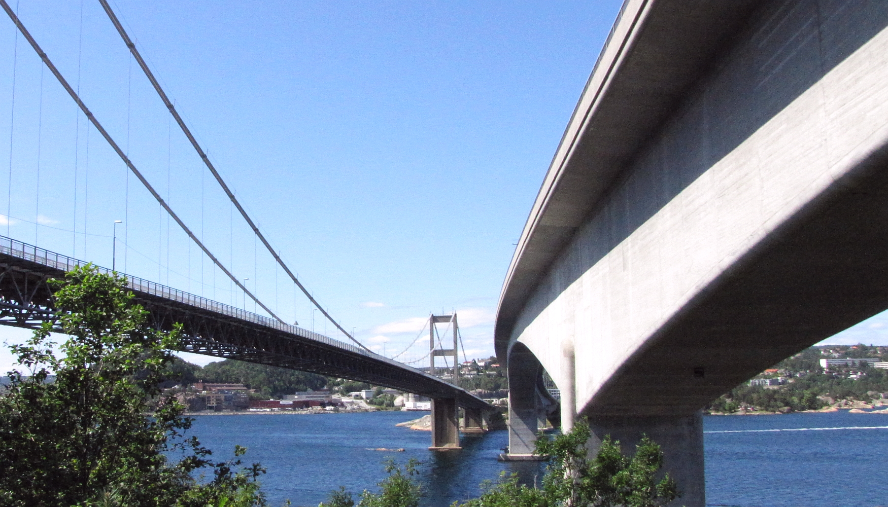 links die alte Varodd-Brücke, rechts die neue Brücke in Kristiansand (Norwegen) - gamle & nye Varoddbrua Foto Wolfgang Pehlemann DSCN1602. Die alte Brücke aus dem Jahr 1956 besitzt eine Länge von 618 m und eine Spannweite von 337 m; die neue Brücke aus dem Jahr 1994 wurde mit einer Länge von 663 m und der größten Spannweite von 260 m errichtet. Über den Brückenkomplex führt die Europastraße 18 (E18), und zwar stadteinwärts nach Kristiansand über die neue Brücke, stadtauswärts über die alte Hängebrücke/Tragseilbrücke. Foto Wolfgang Pehlemann DSCN1607.jpg